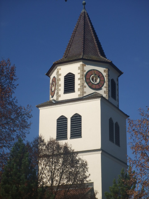 Erpfingen, Gemeinde Sonnenbühl, Landkreis Reutlingen Evangelische Naboriuskirche